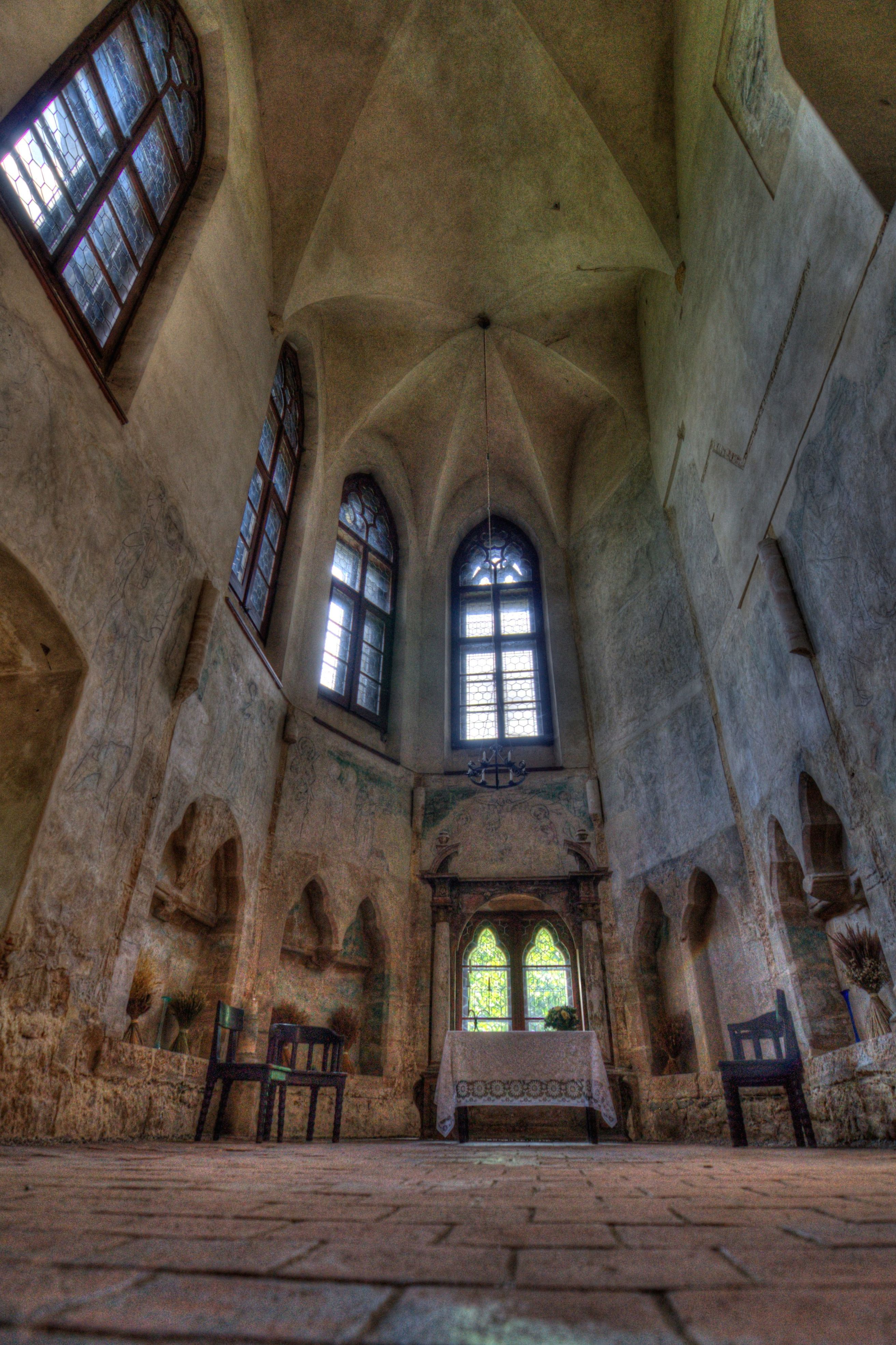 Celkový pohled na hradní kapli